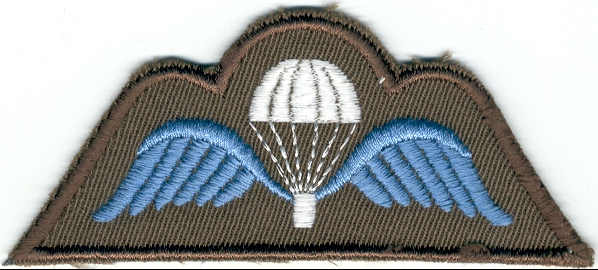 photocopie d'un brevet personnel